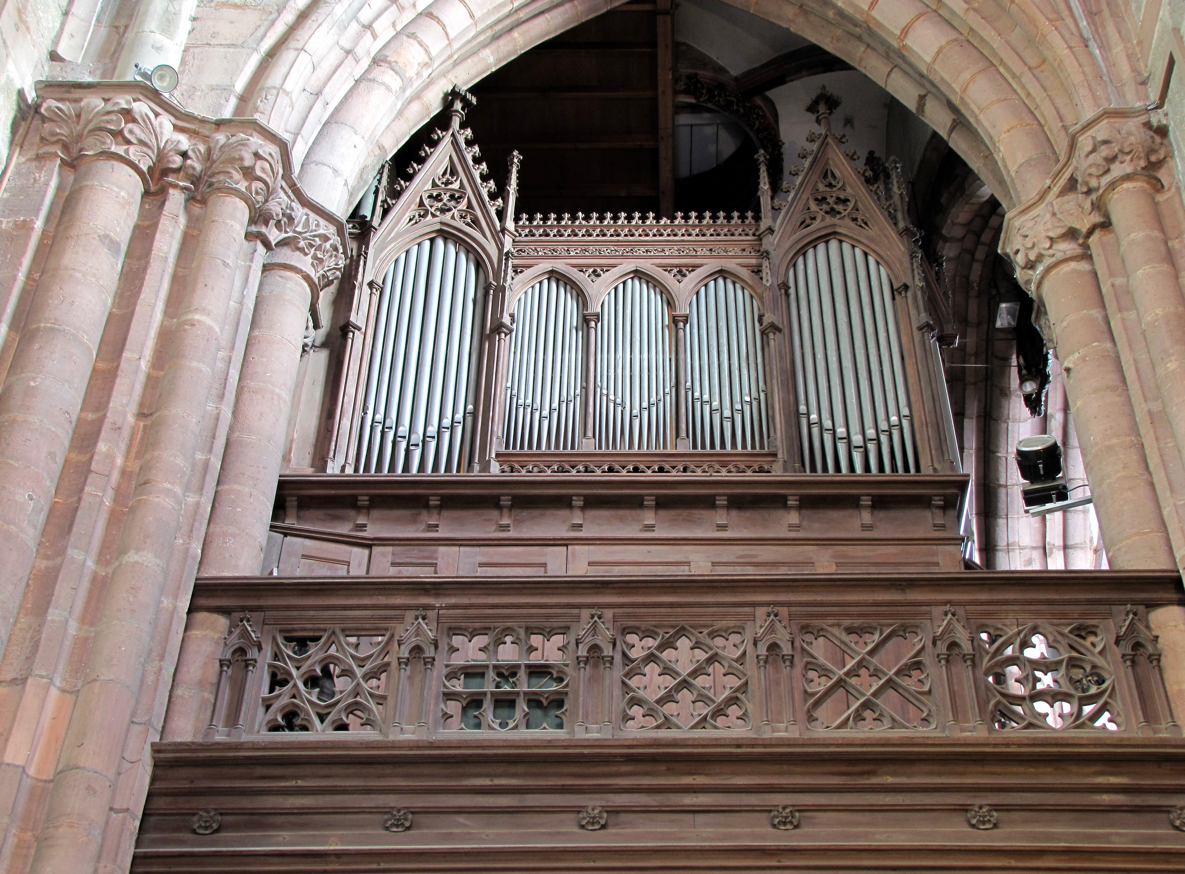 Alsace, Bas-Rhin, Sélestat, Église Saint-Georges (PA00084978, IA00124588). Orgue de Martin Rinckenbach et son garde-corps néo-gothique de Théophile Klem (1896)